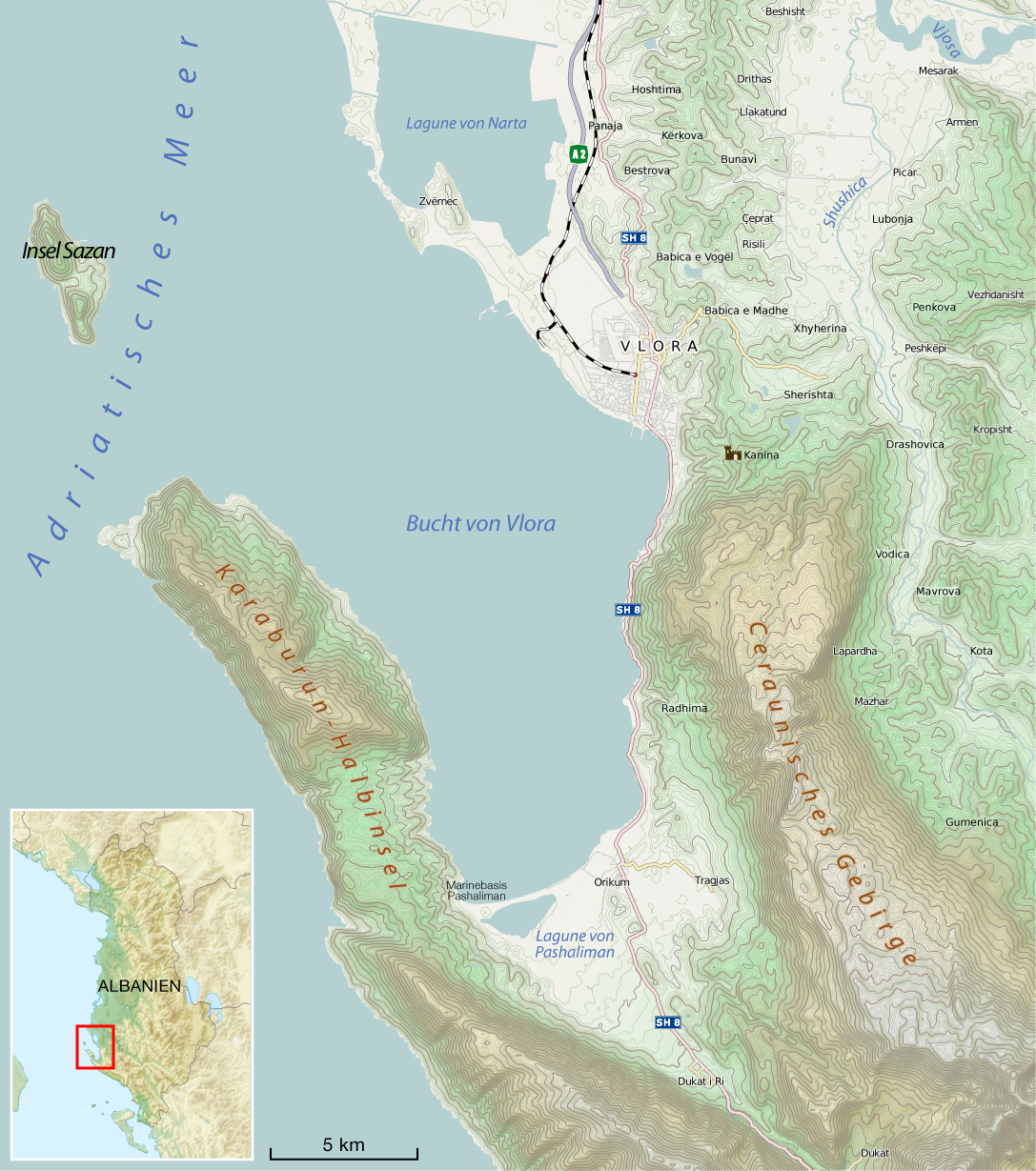 Karte der Bucht von Vlora mit der vorgelagerten Insel Sazan, Albanien